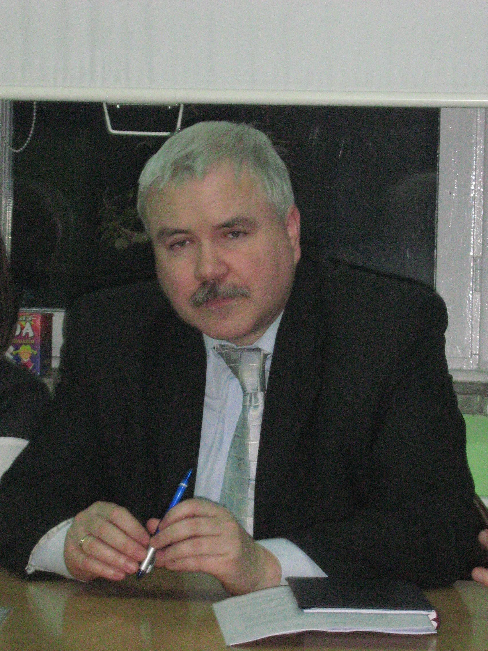 Poseł Konstanty Oświęcimski podczas spotkania z mieszkańcami Wolina